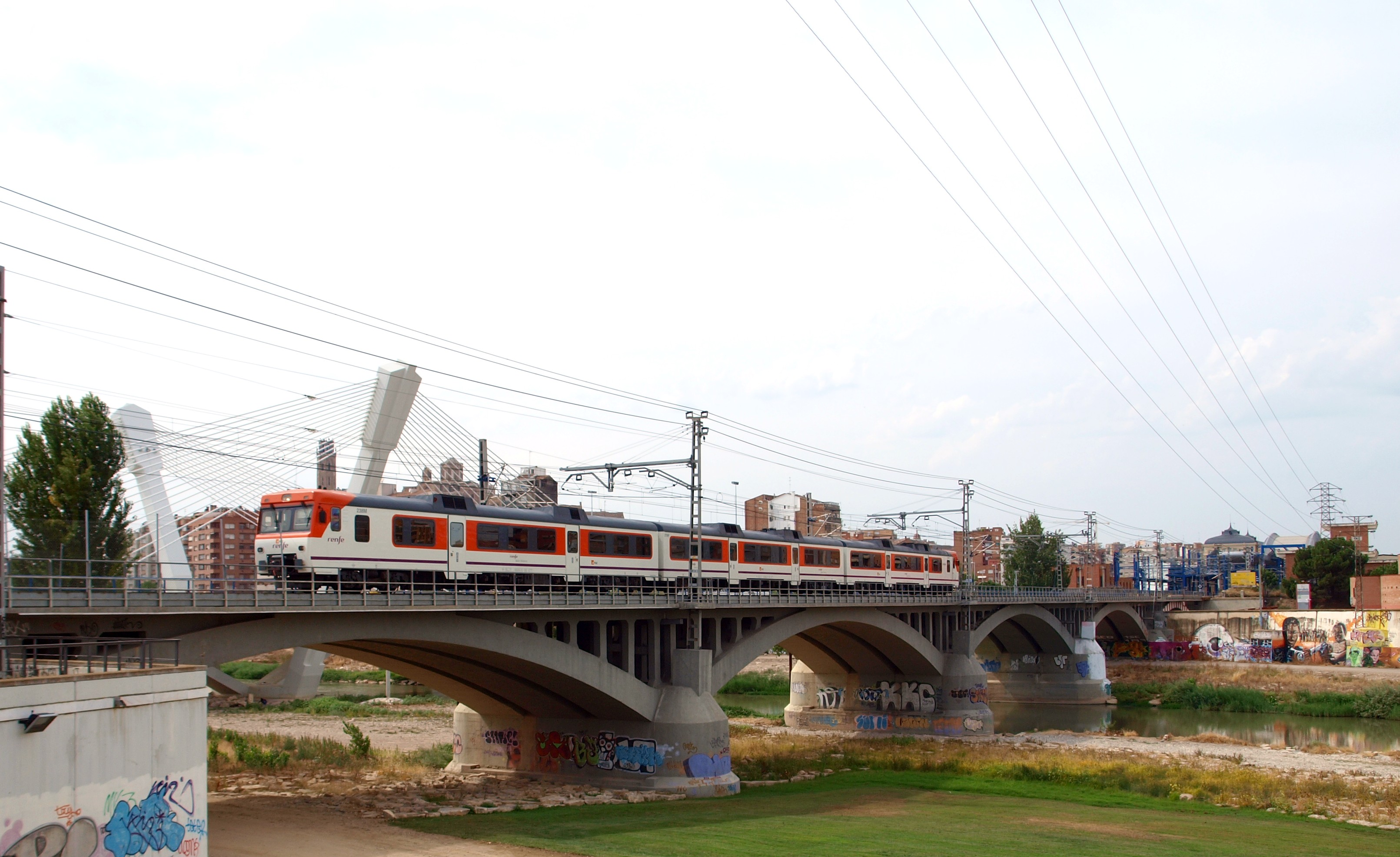 Unitat 592 de Renfe arribant a Lleida